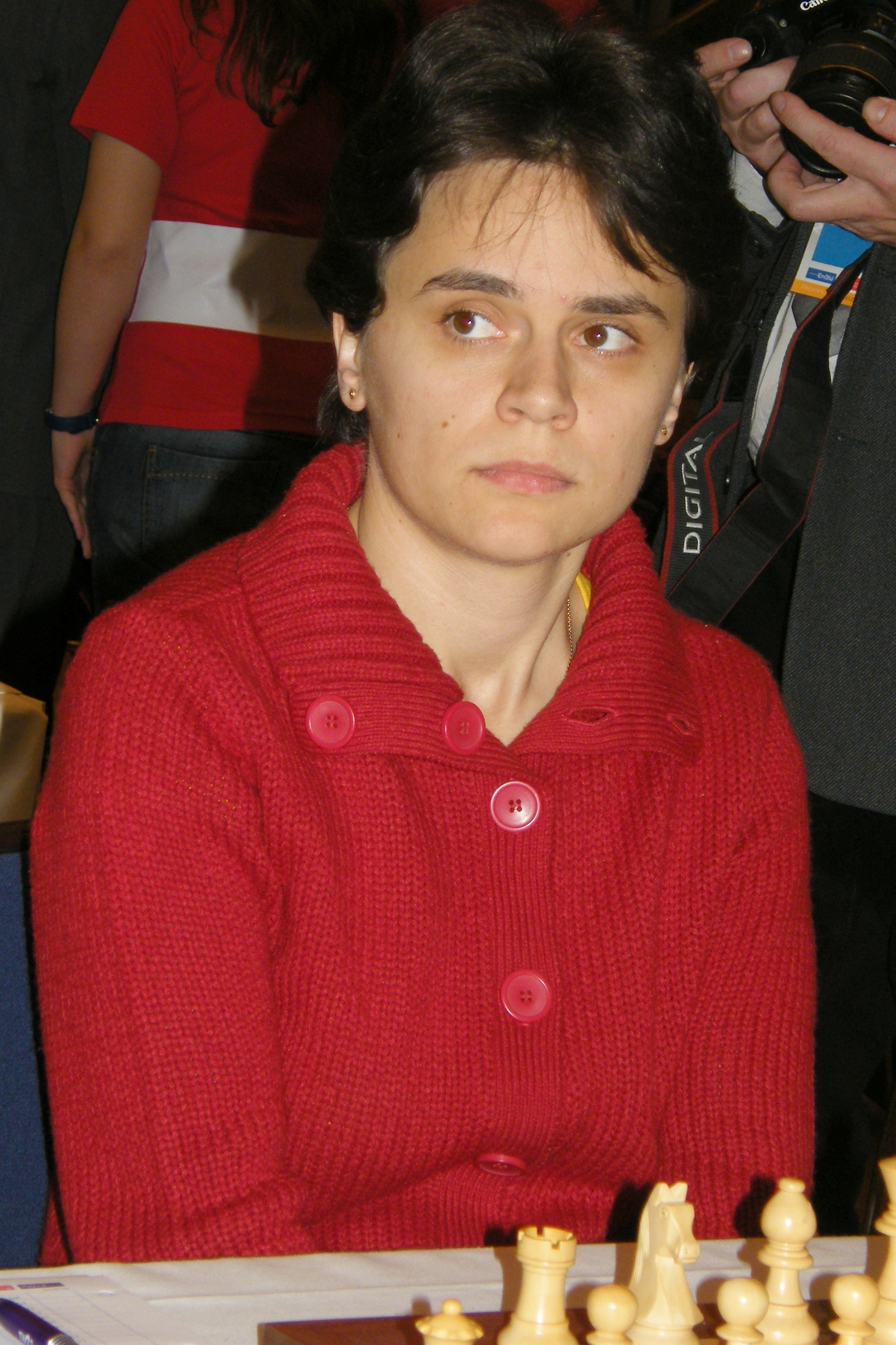 Corina-Isabela Peptan bei der 38. Schacholympiade in Dresden 2008